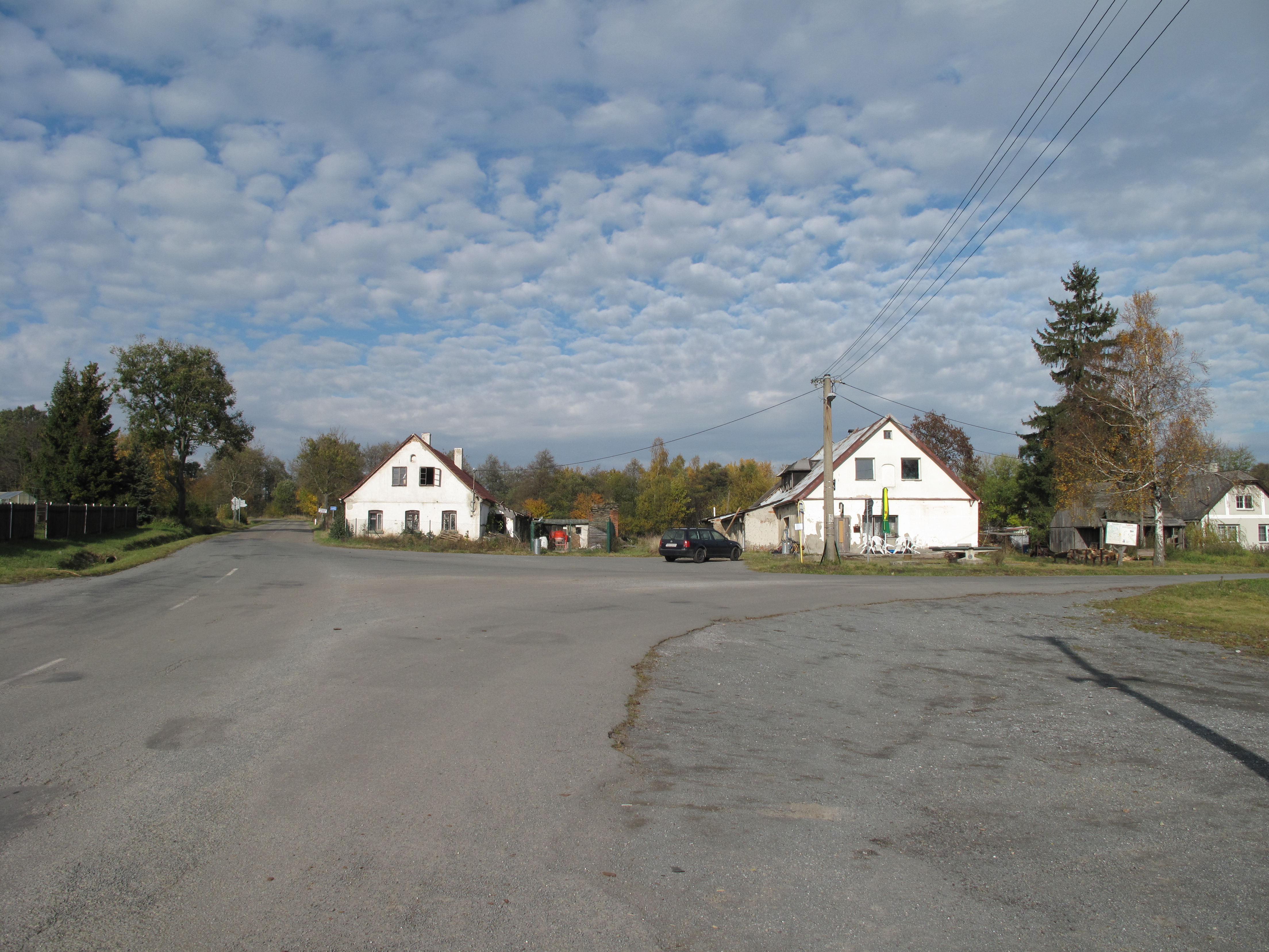 Stará Libavá. Okres Olomouc, Česká republika.